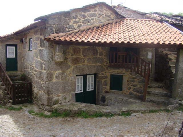 Casa de Turismo Rural, lugar de Cutelo (Cibões - Terras de Bouro)